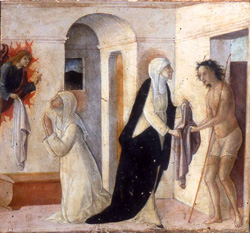 Pietro di Francesco degli Orioli, Caterina dona la veste al povero - Cristo in visione mostra a Caterina la veste ornata di pietre preziose, sec. XV (fine nono-inizi ultimo decennio), Siena, Pinacoteca Nazionale (n. 421)